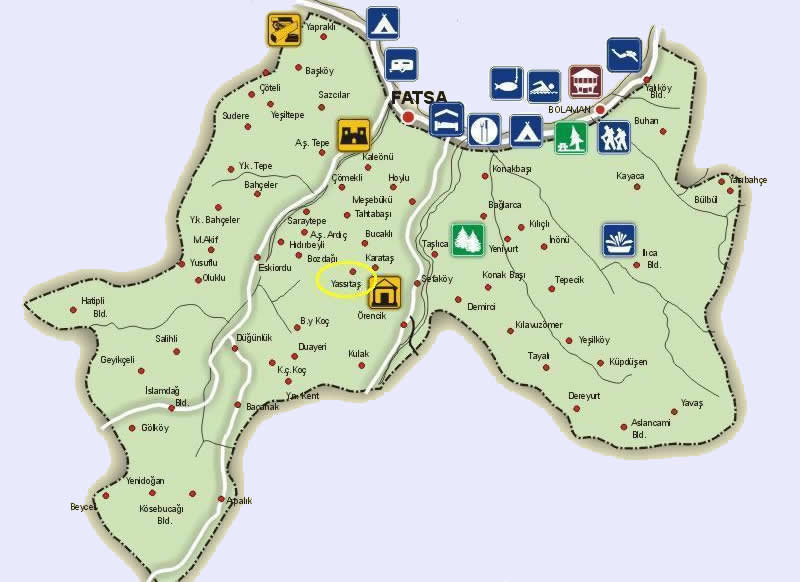 Fatsa